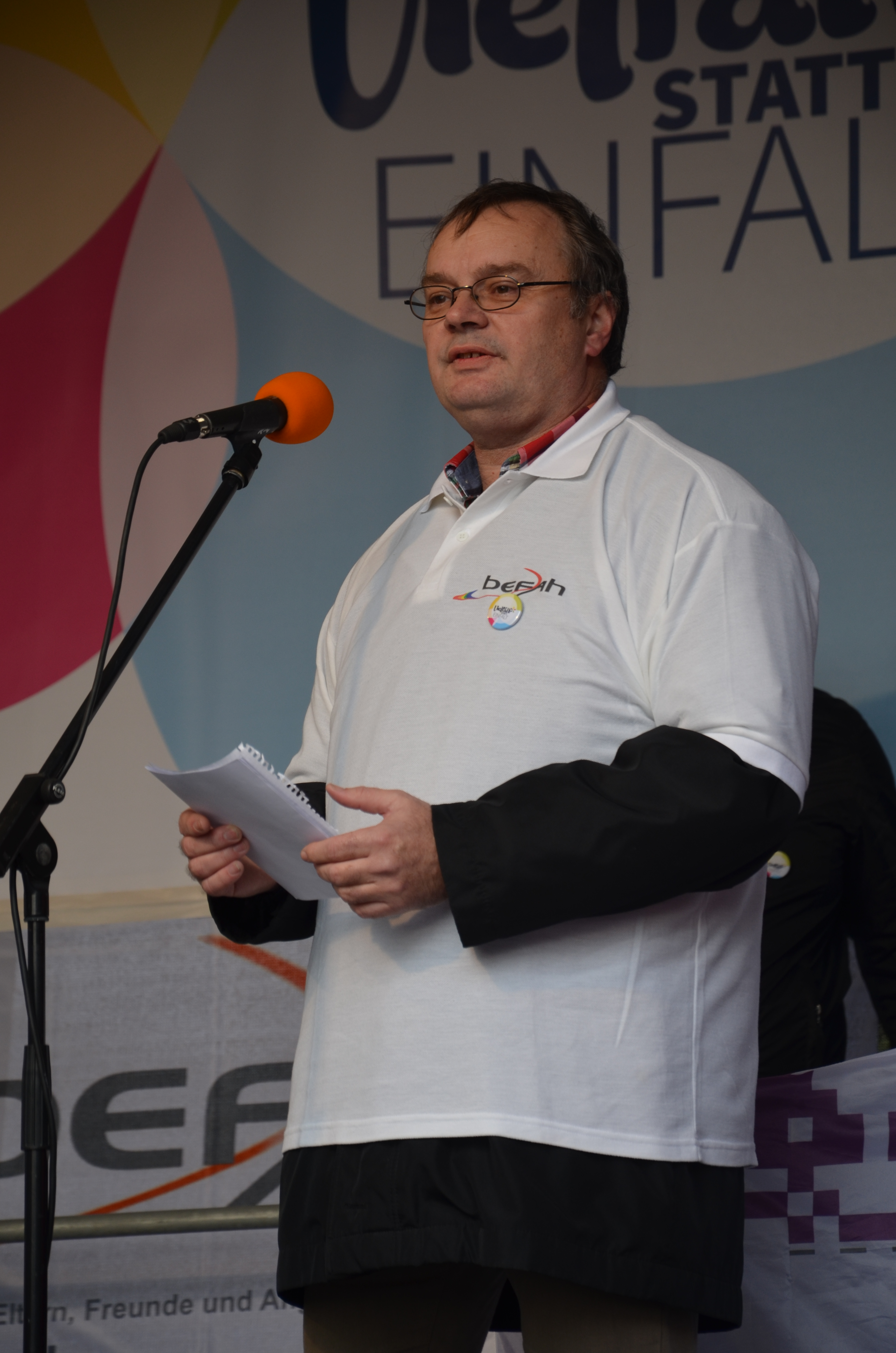 Zu der Kundgebung unter dem Motto Vielfalt statt Einfalt, zu der sich bundesweit mehr als 40 Organisationen, Gruppen und Einzelpersonen zusammengefunden haben, fand am 22. November 2014 auf dem Platz der Goseriede in Hannover eine bunte Kundgebung statt. Mehrere hundert Menschen hatten sich zusammengefunden mit dem Ziel, das Schwule, Lesben, Trans- und Intersexuelle Menschen zukünftig keine Ausgrenzung mehr erfahren, sondern in ihrer freien Persönlichkeitsentwicklung schon durch den Schulunterricht frühzeitig gefördert werden. Bereits am Vortag der Kundgebung hatte die Stadt Hannover den nahegelegenen Platz Am Steintor, auf dem am selben Tag eine weitere, sogenannte Demo für Alle startete, zahlreiche Regenbogenfahnen hochgezogen als für alle sichtbares Zeichen der Bereicherungen des gemeinschaftlichen Zusammenlebens und -arbeitens vielfältiger Identitäten und Kulturen in der niedersächsischen Landeshauptstadt ...